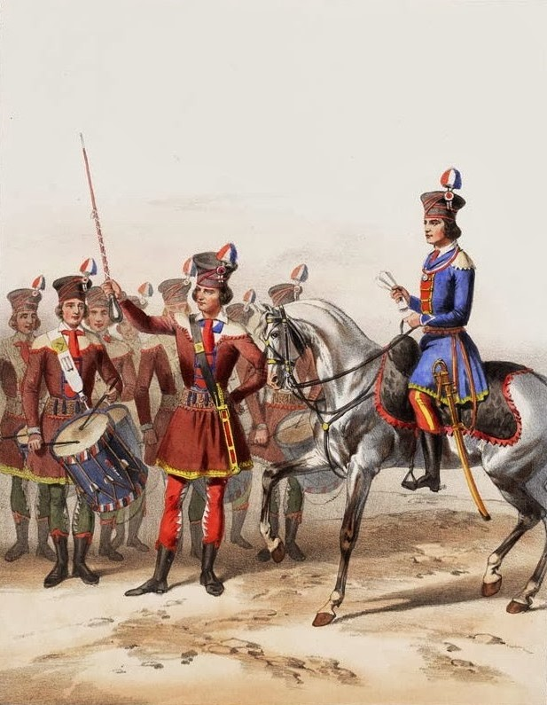 Élèves de l’école de Mars ou camp des Sablons 1794 (Document Archives municipales de Neuilly-sur-Seine) uniforme déssiné par David